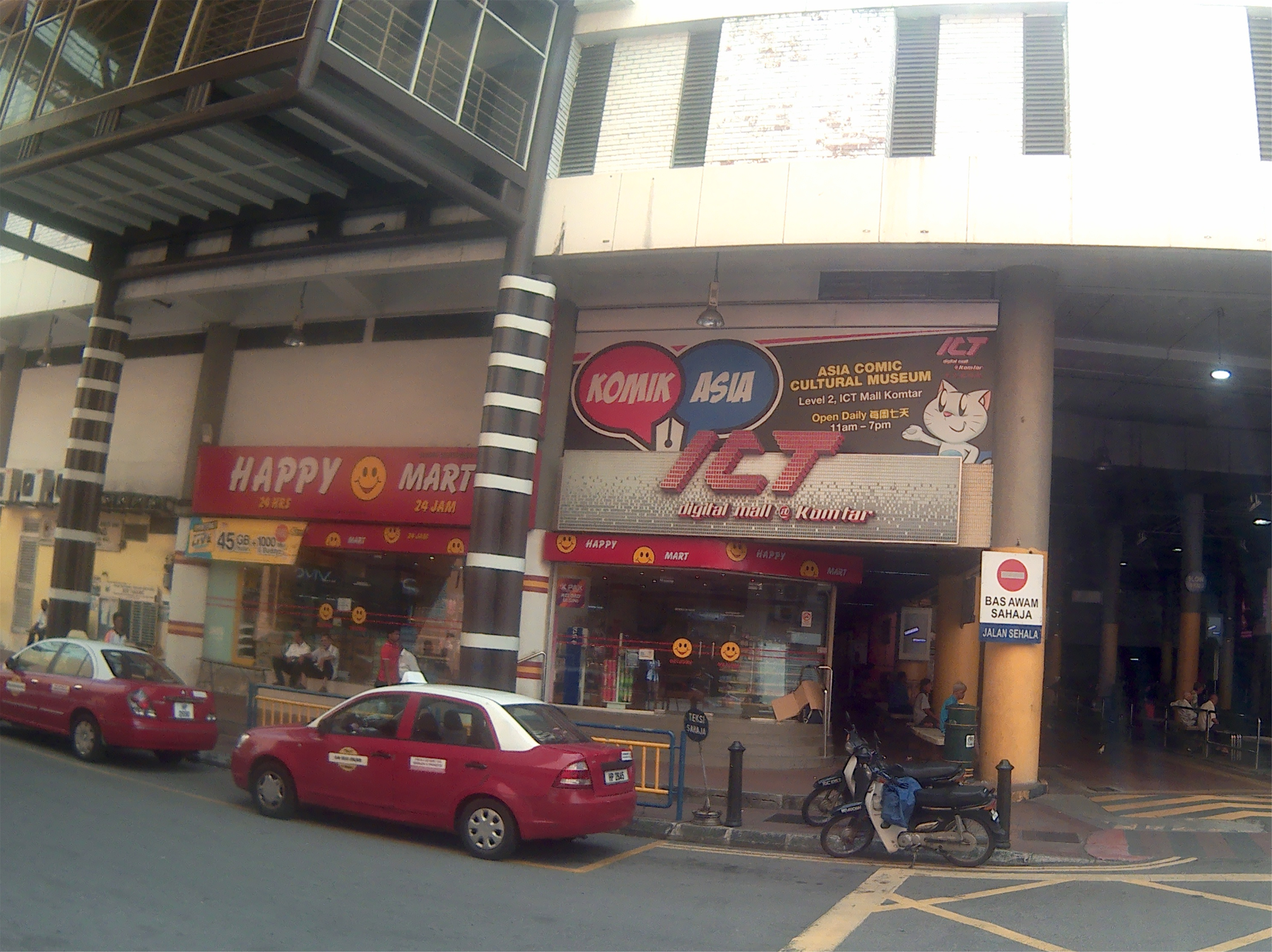 光大数码城